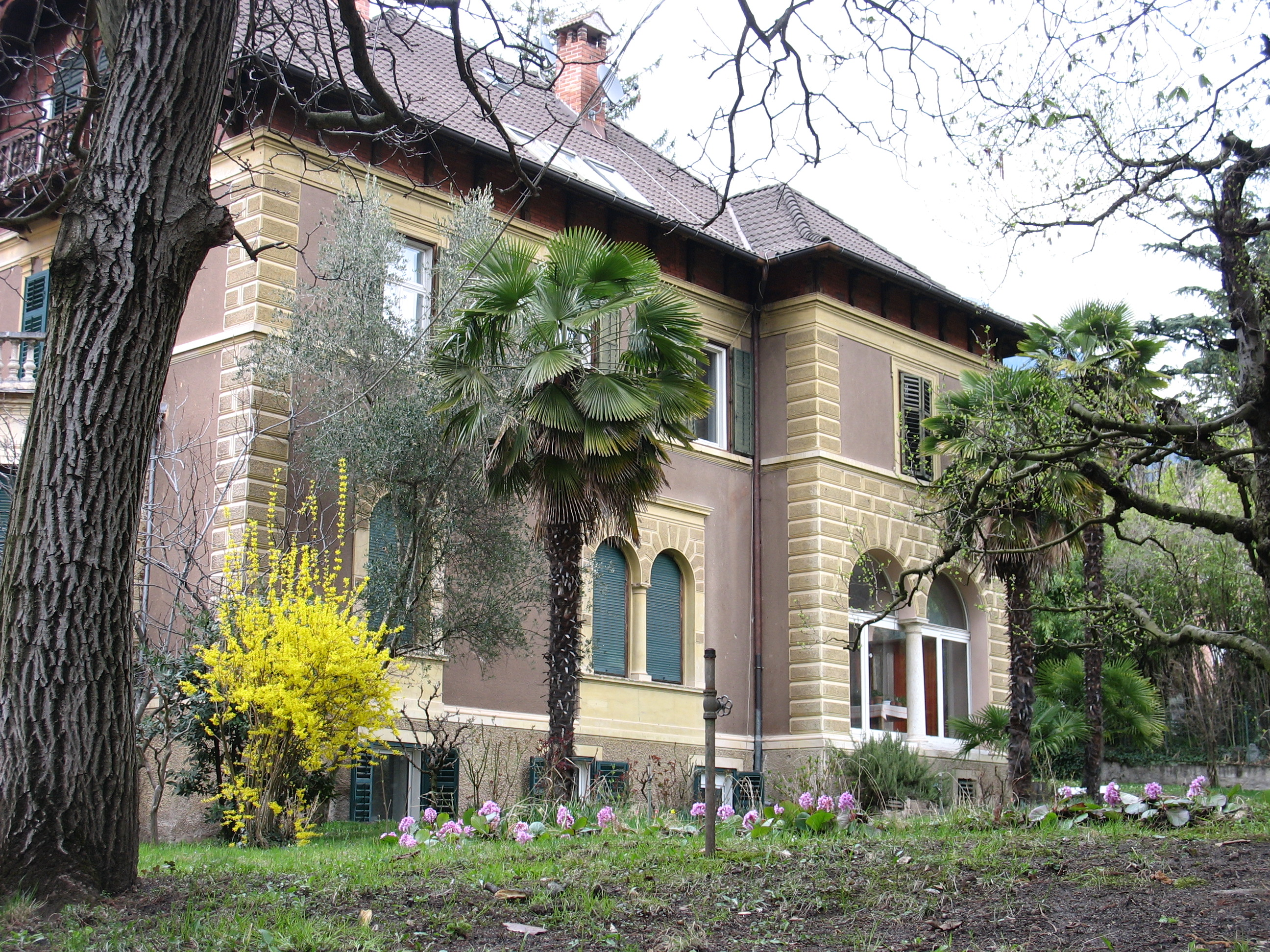 Slatin Paschas Alterswohnsitz „Villa Mathilde“ in Obermais, Südtirol